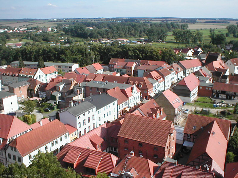 Blick von der St. Johanniskirche über die Altstadt (mit Steintor) von Malchin, Mecklenburg-Vorpommern, Deutschland